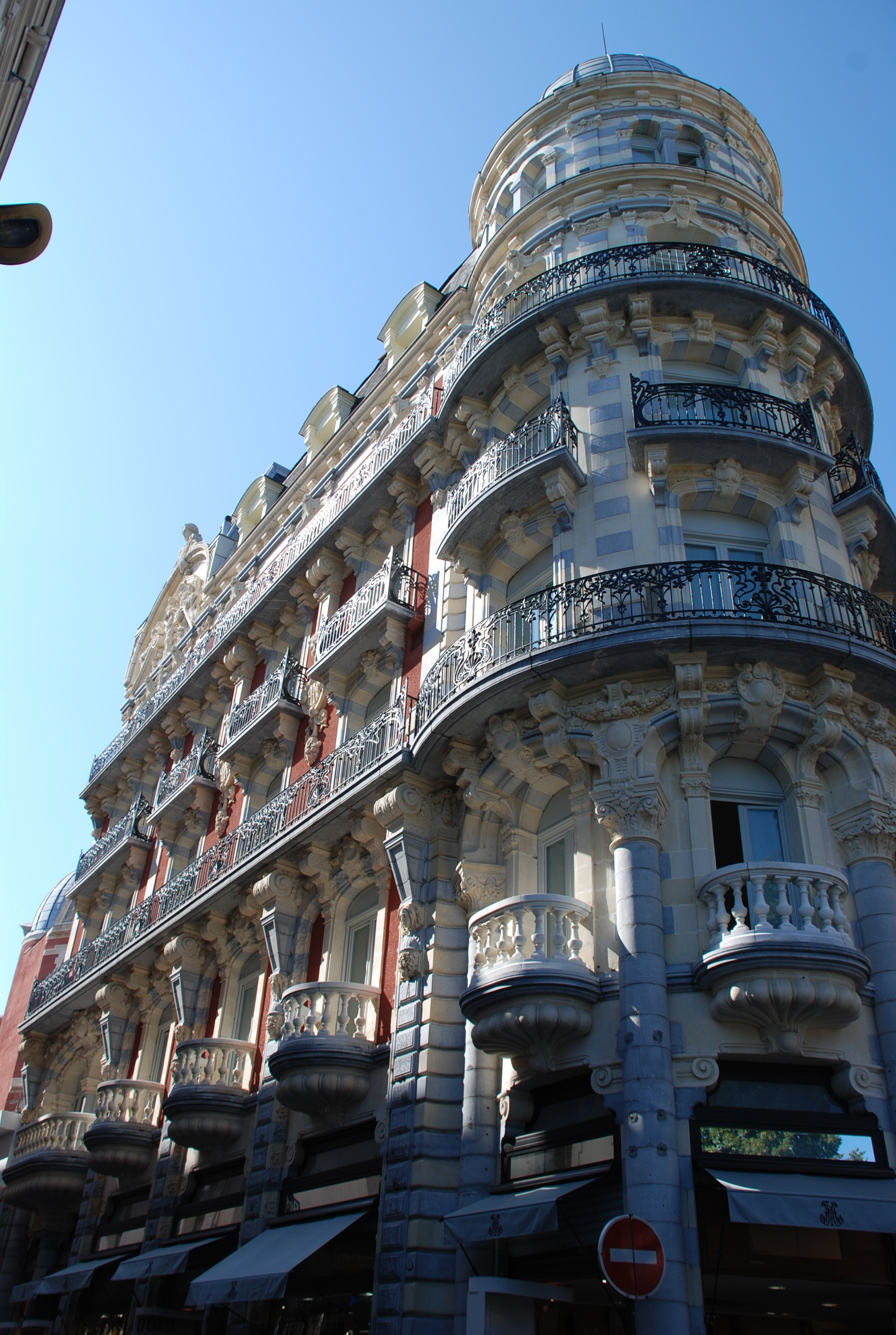 Lourdes (Hautes-Pyrénées, France) - Hôtel Moderne Soubirous.